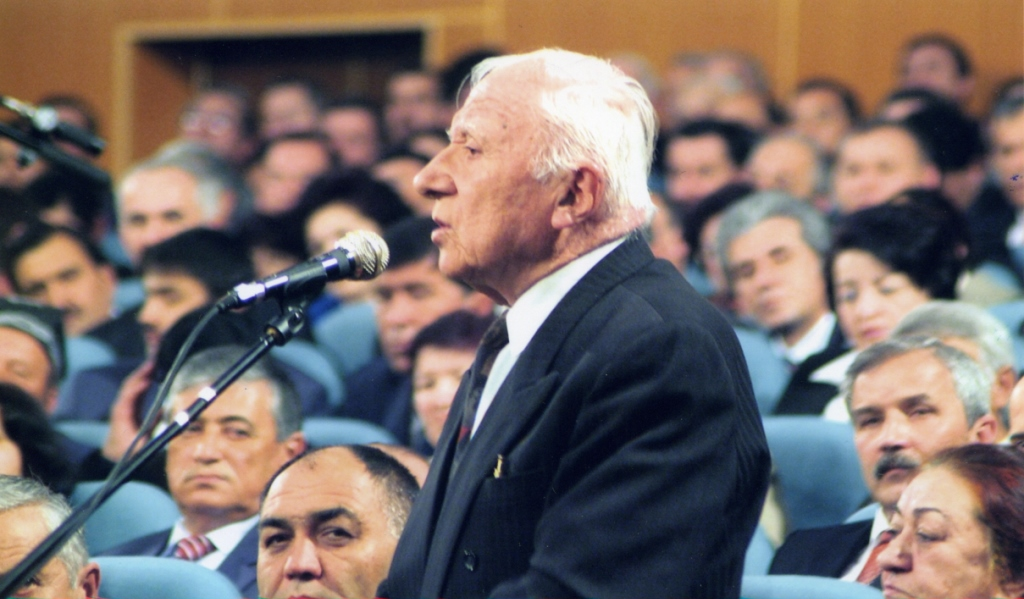 Камол Айни академик Академии наук Республики Таджикистан, (востоковед), выступление на одном из совещаний, г. Душанбе